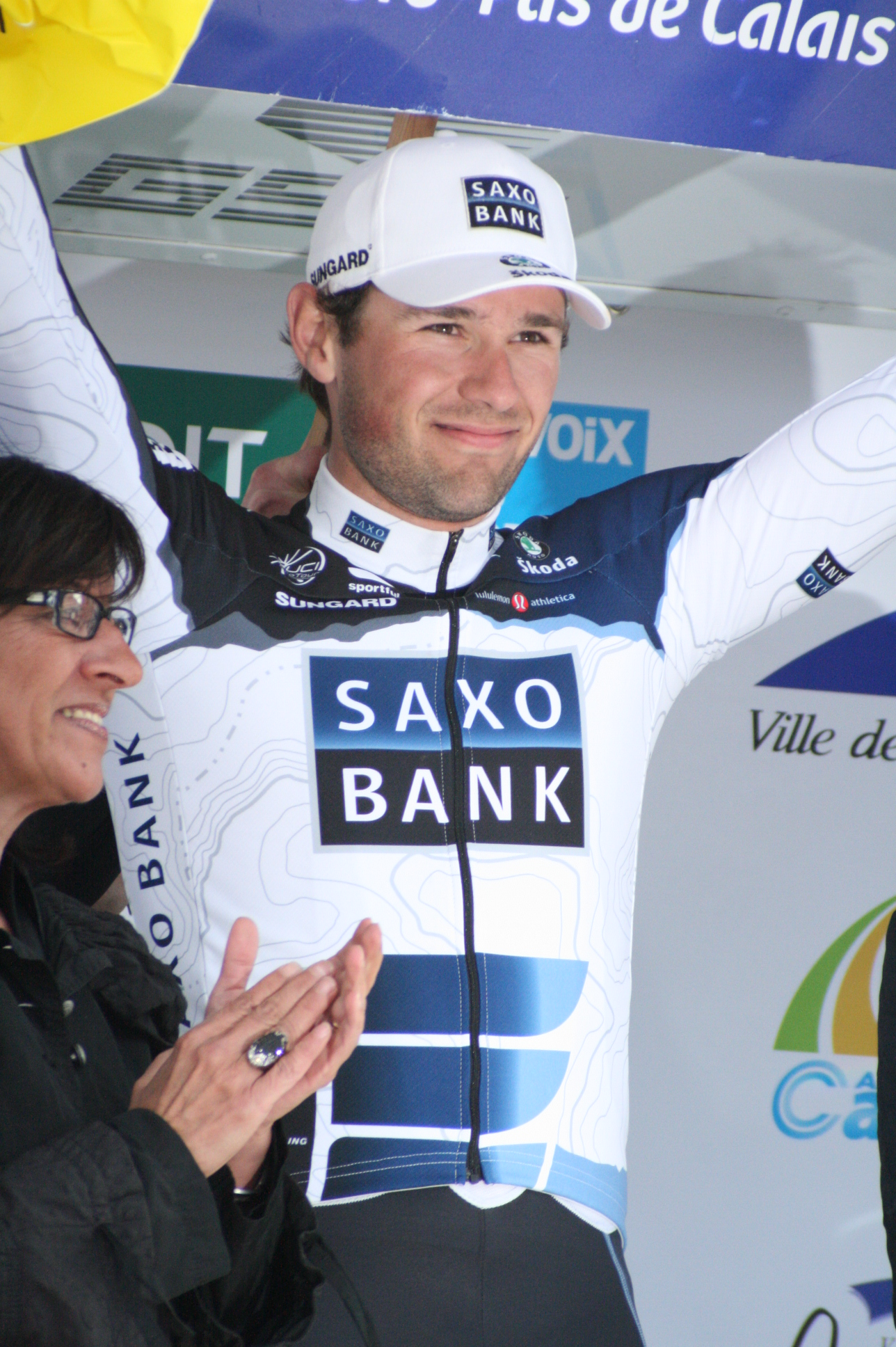 Alex Rasmussen sur le podium de la 1re étape des Quatre jours de Dunkerque 2010